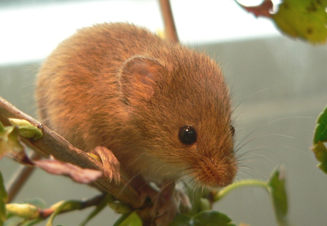 Zwergmaus (Micromys minutus), fotografiert 9/2005 von Hendrik Osadnik